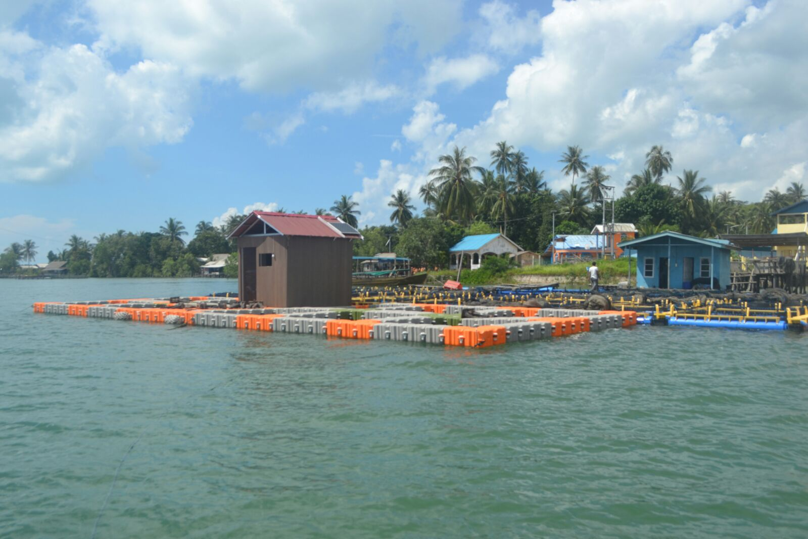 Keramba Jaring Apung dan Pos Jaga di Pulau Bintan - Provinsi Kepulauan Riau